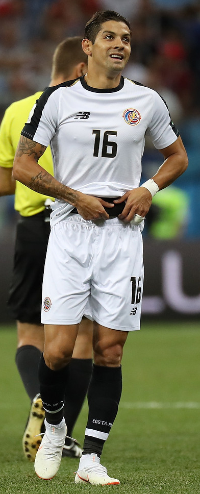 Швейцария играет вничью с Коста-Рикой и выходит в плей-офф ЧМ со второго места в группе